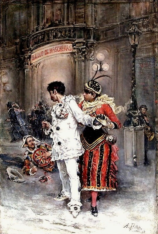 Szene aus „Un ballo in maschera“ von Verdi, Öl auf Leinwand, bezeichnet "Roma", datiert (18)84, 60 x 41 cm